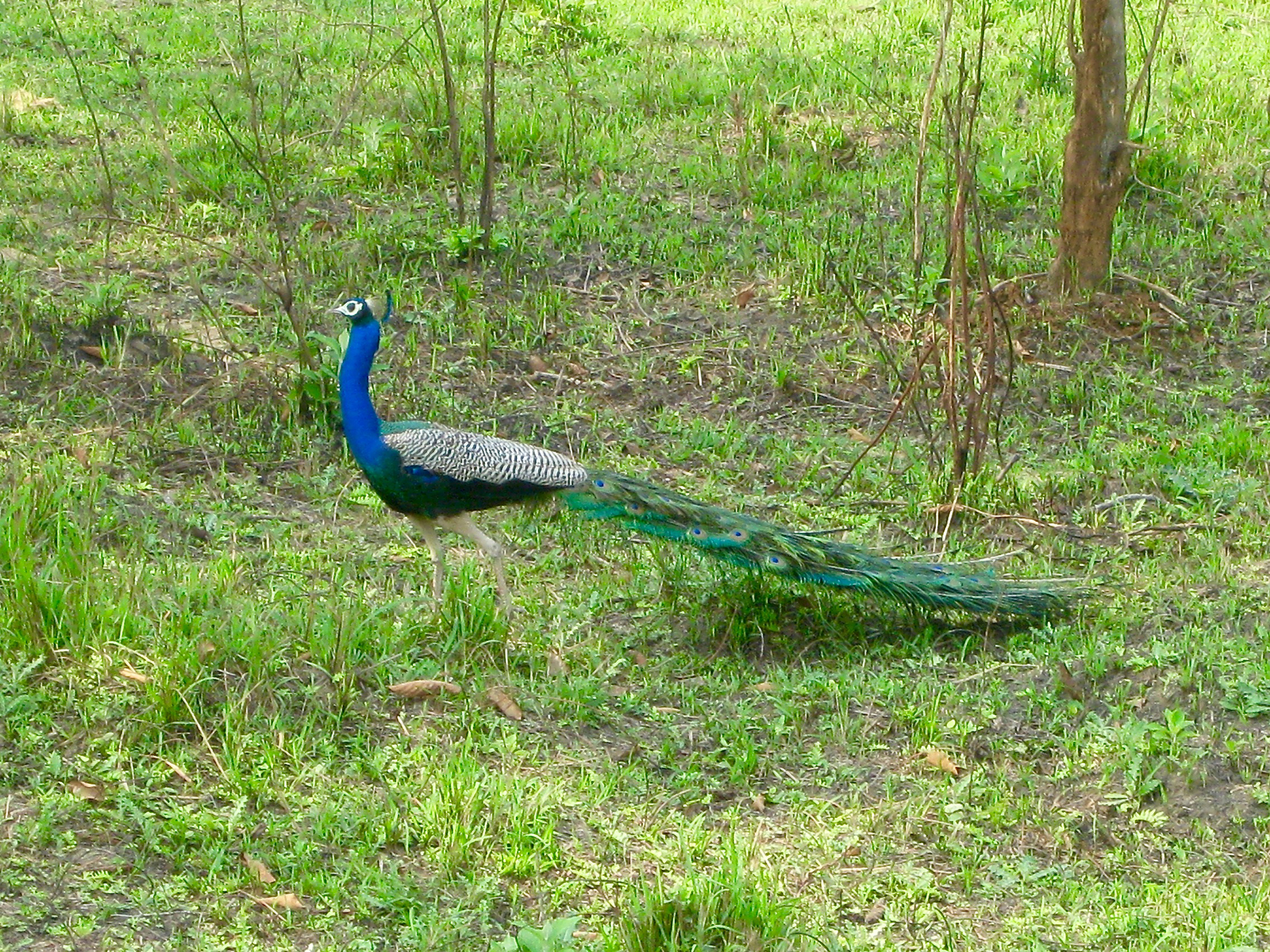 नेपाली: चितवन राष्ट्रिय निकुन्जभित्र देखिएको मयुर।